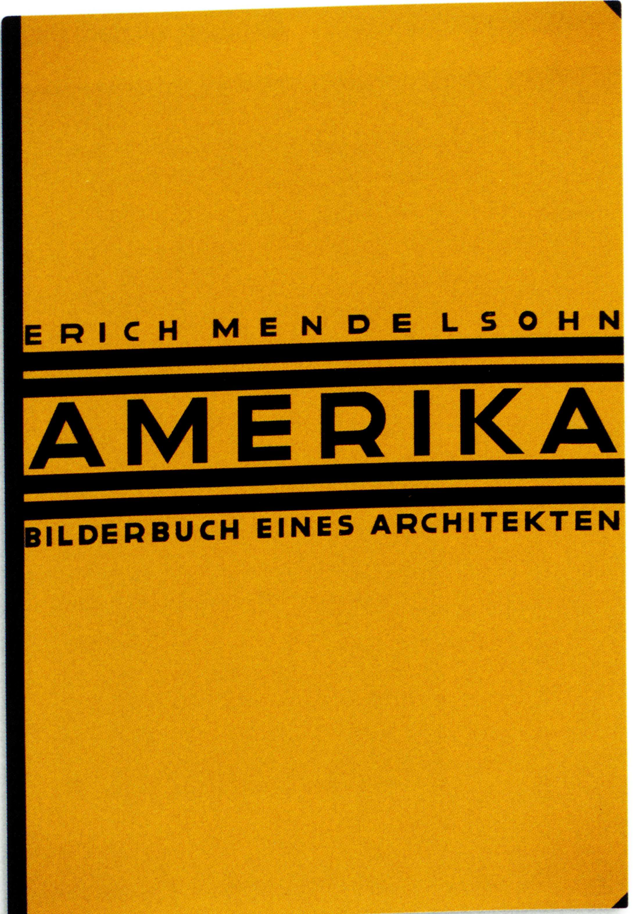 Erich Mendelsohn Amerika Einband 1926